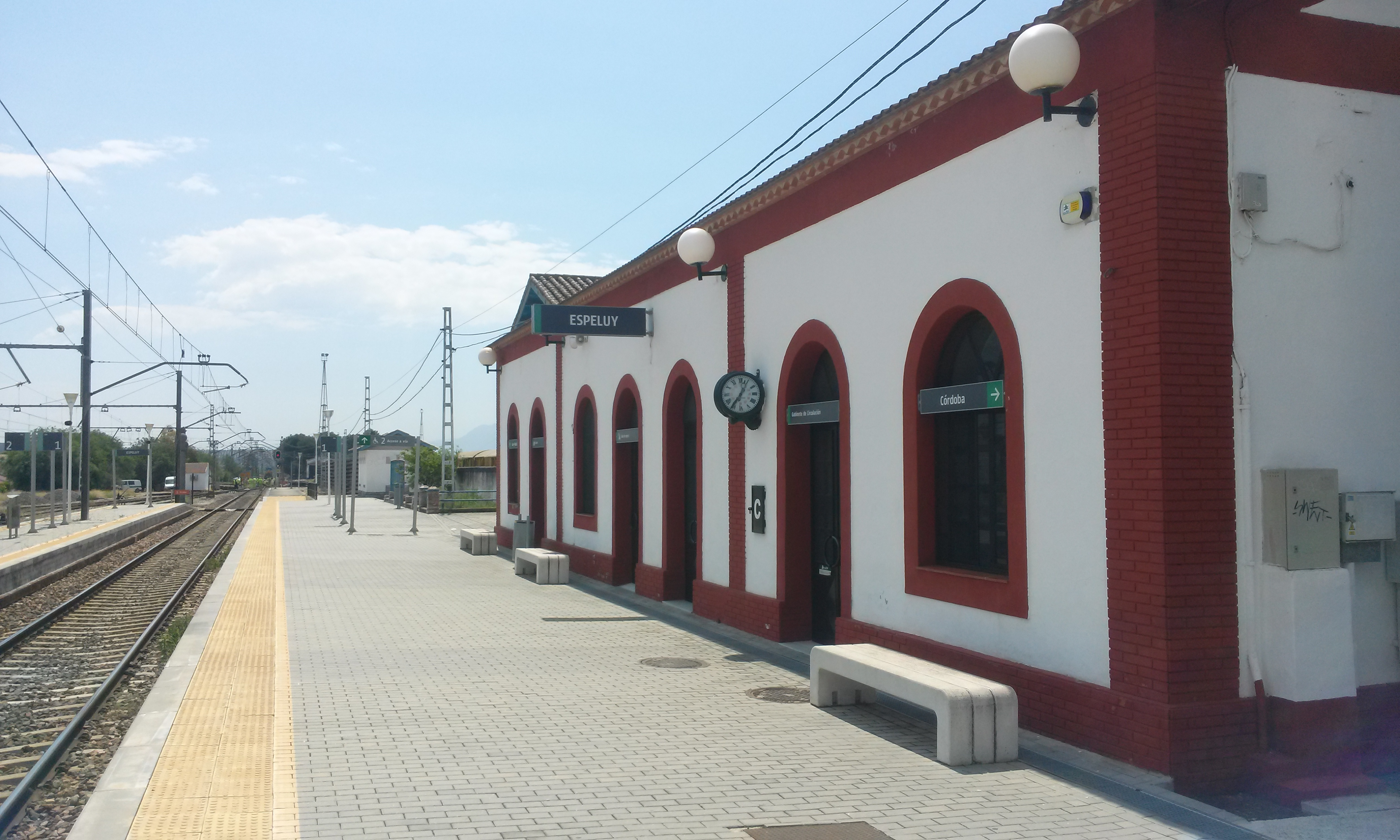 Vías y apeadero en la Estación de Espelúy.